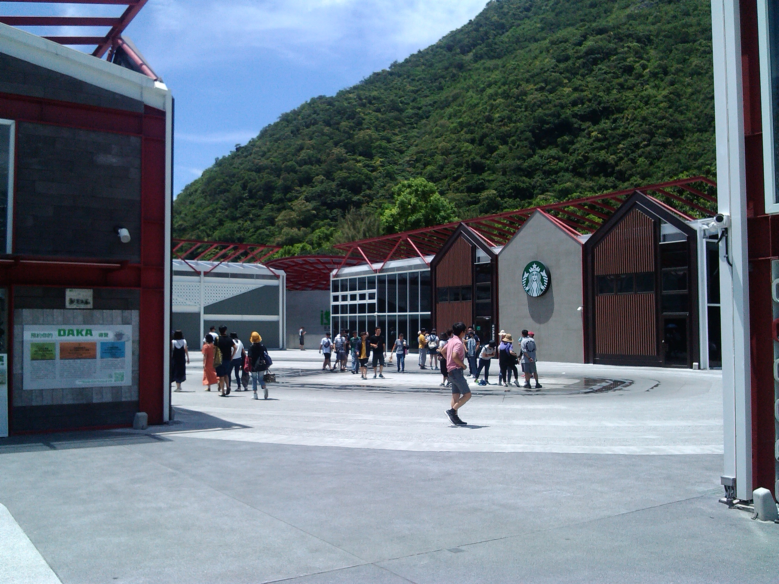 園區內設有7-11、星巴克和地方特產販售小舖